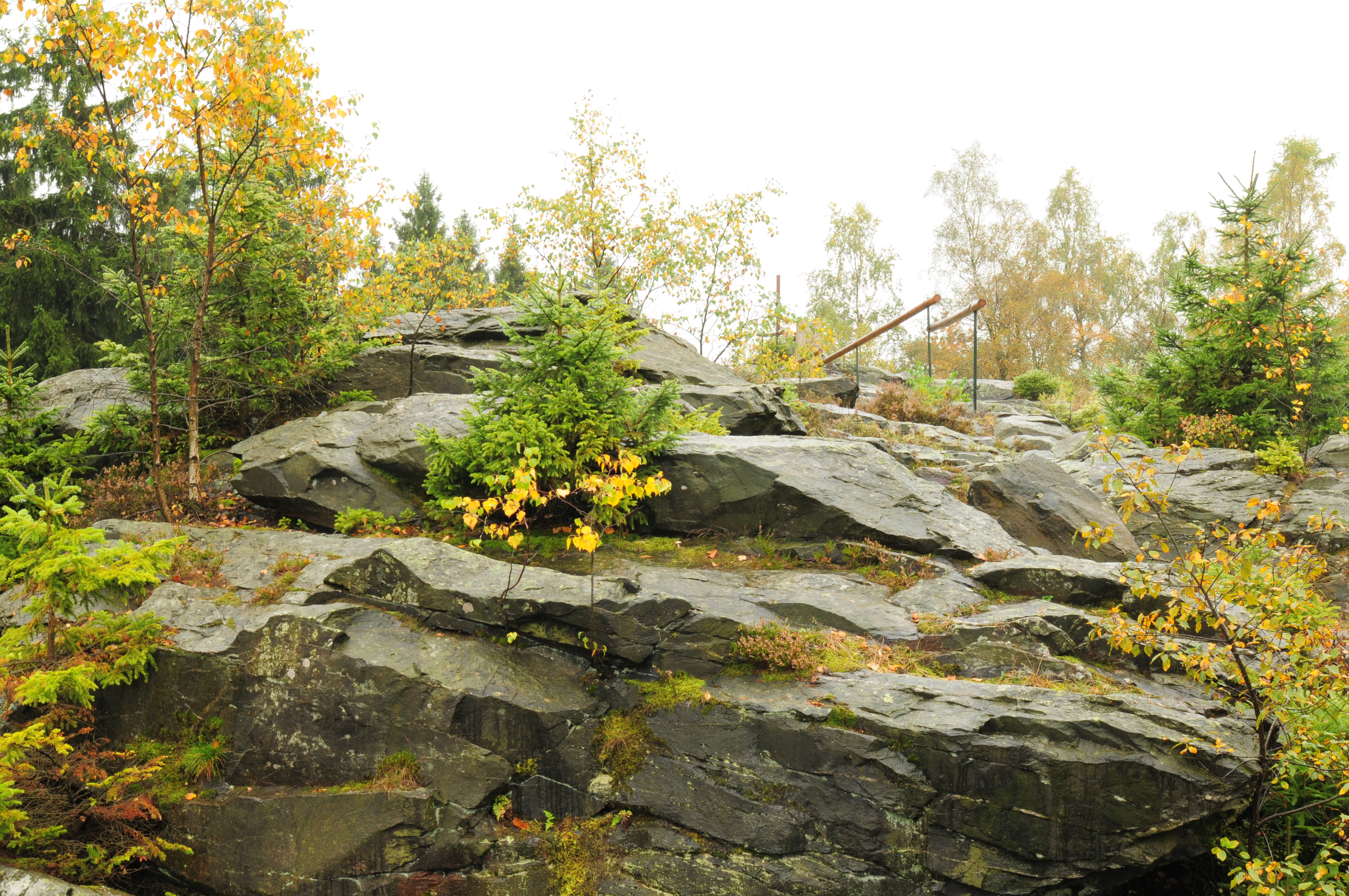 Grünbach, Wendelstein (732 m) Quarzitklippe (Vogtlandkreis, Sachsen, Deutschland)